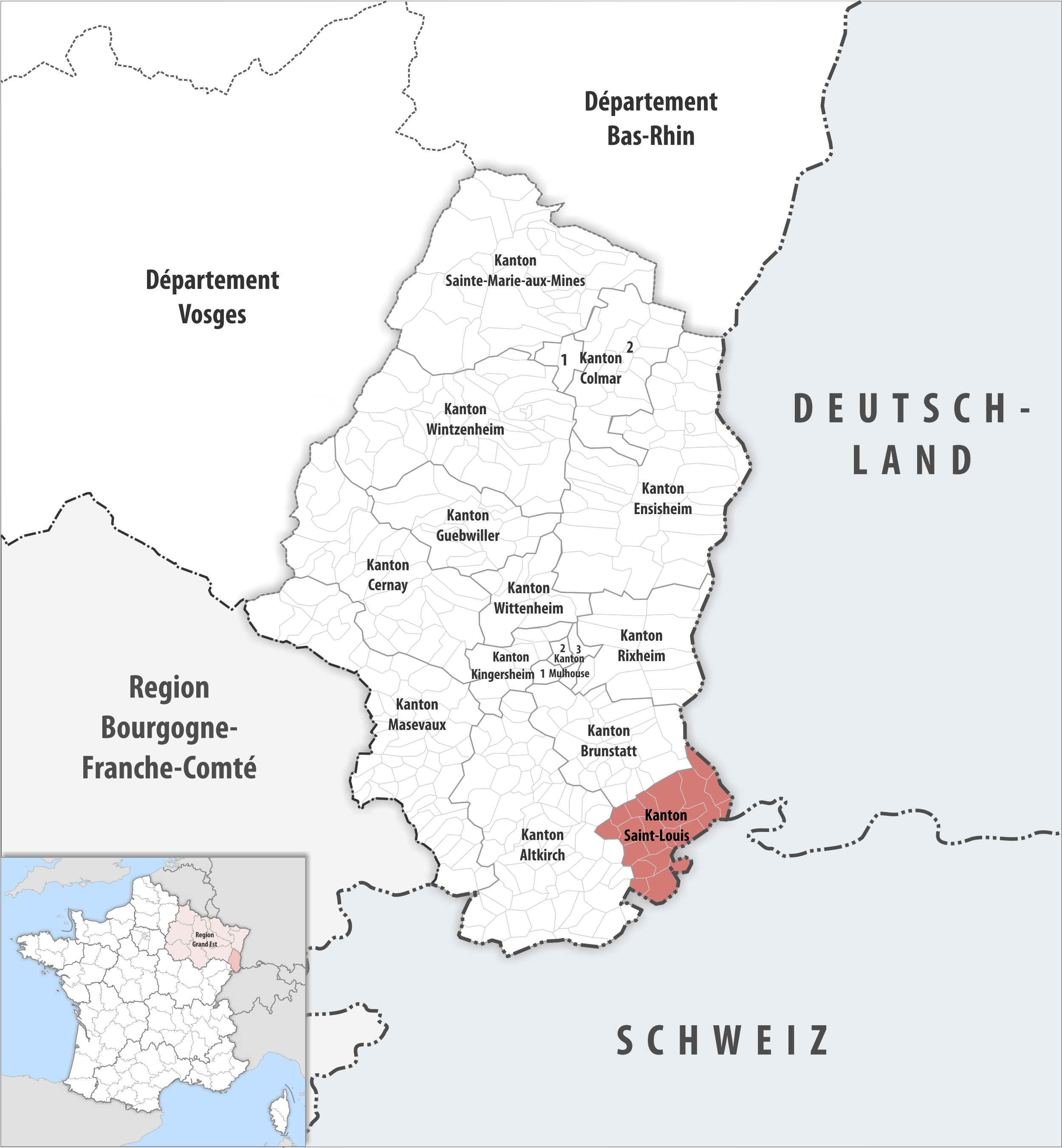 Lage des Kantons Saint-Louis